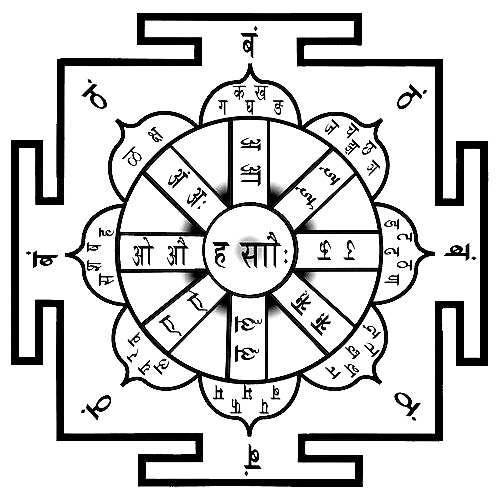 Янтра Восьми Матрик